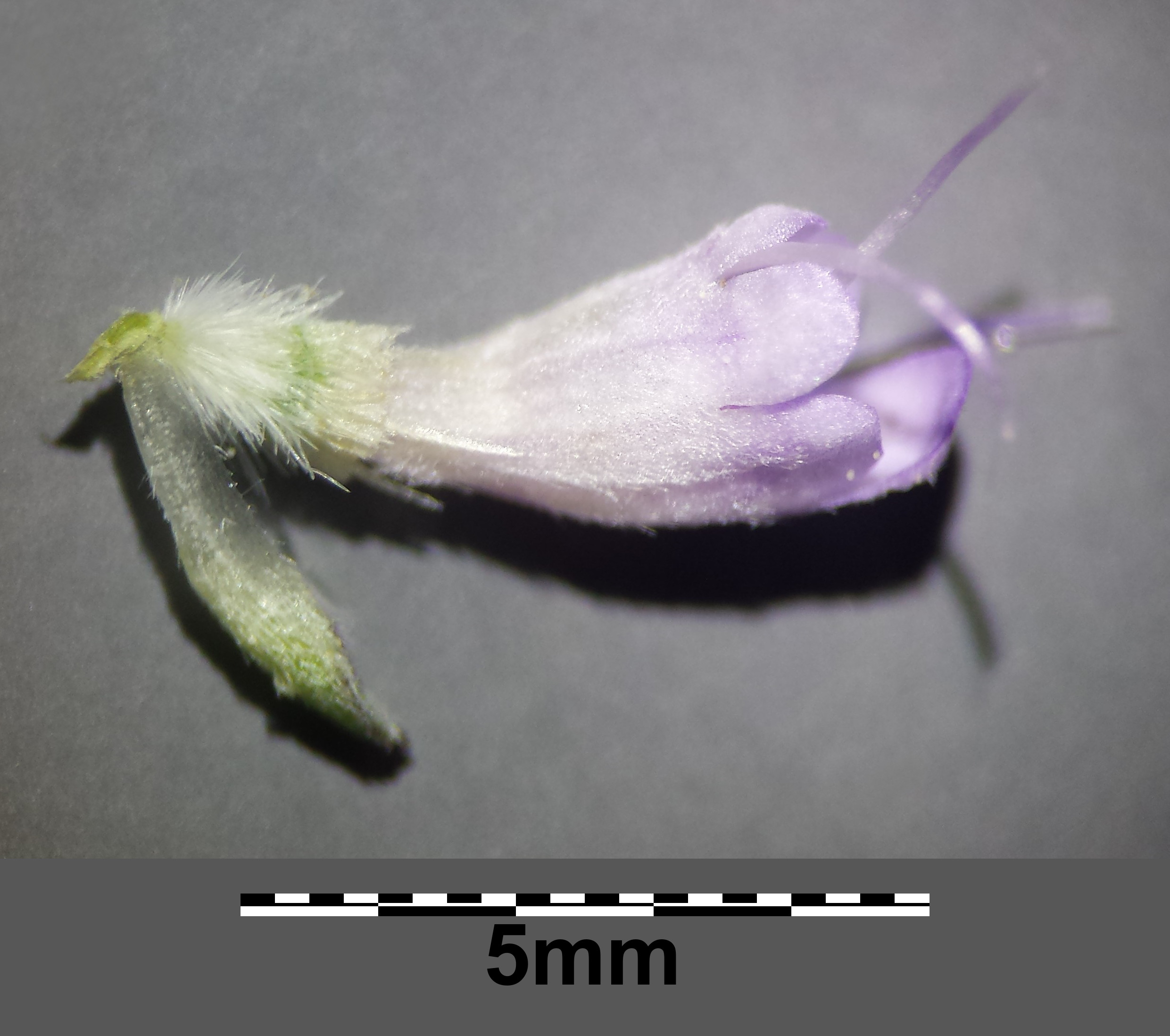 Blüte mit Deckblatt Taxonym: Scabiosa canescens ss Fischer et al. EfÖLS 2008 ISBN 978-3-85474-187-9 Fundort: Lössberg westlich von Großebersdorf, Bezirk Mistelbach, Niederösterreich - ca. 200 m ü. A. Standort: Halbtrockenrasen